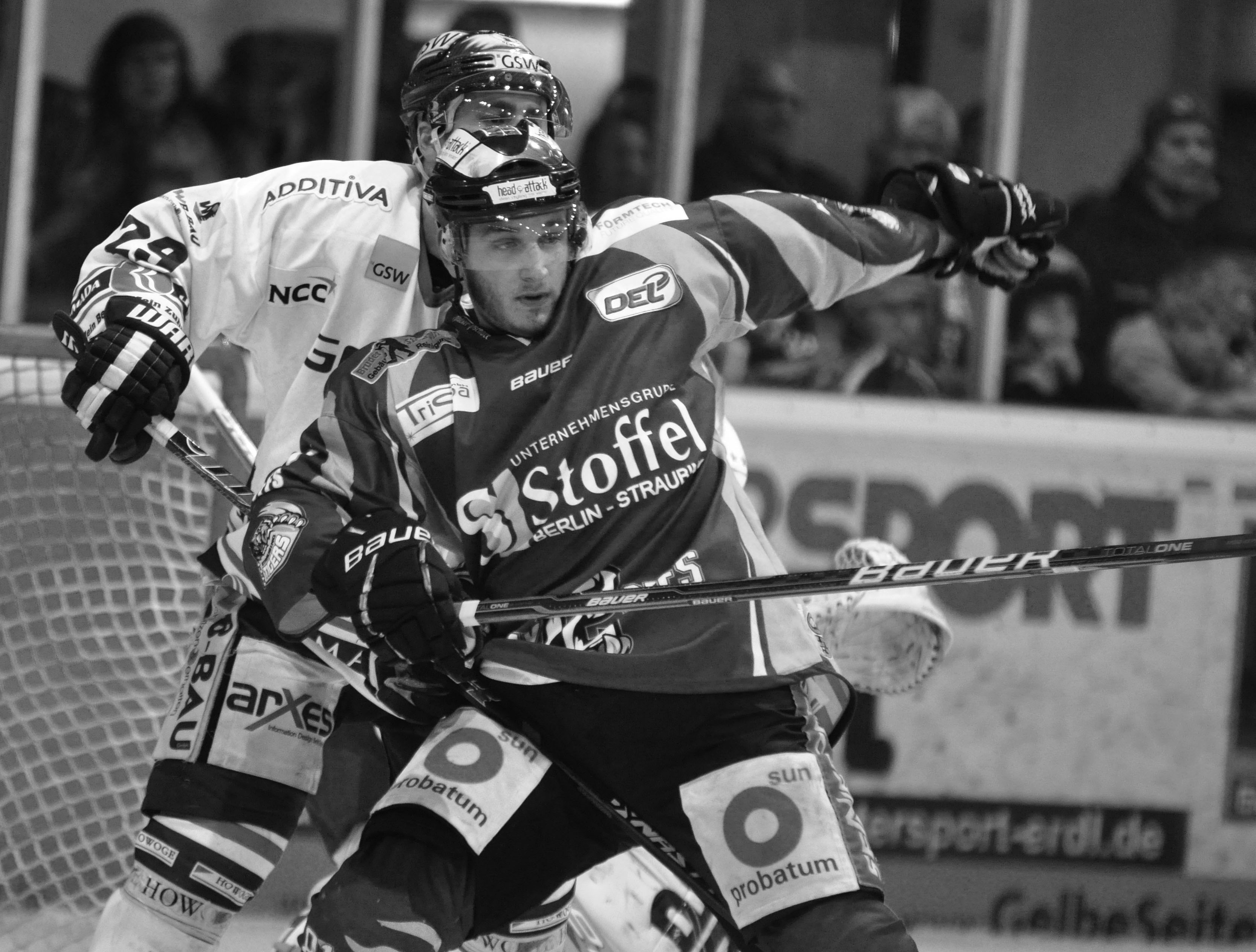 Straubing Tigers - Eisbären Berlin 07.04.2012 DEL PlayOff Halbfinale